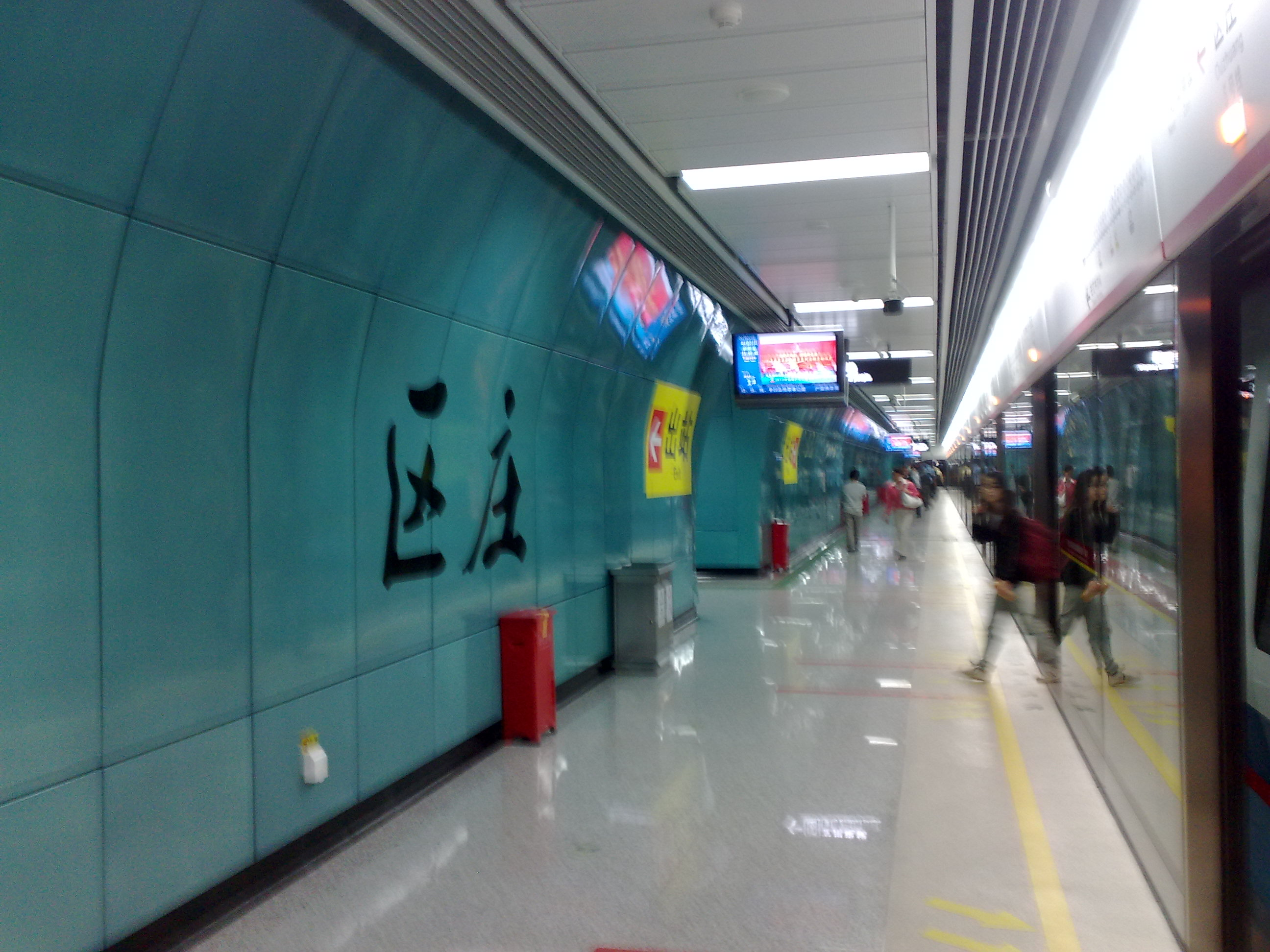 廣州地鐵區莊站站台